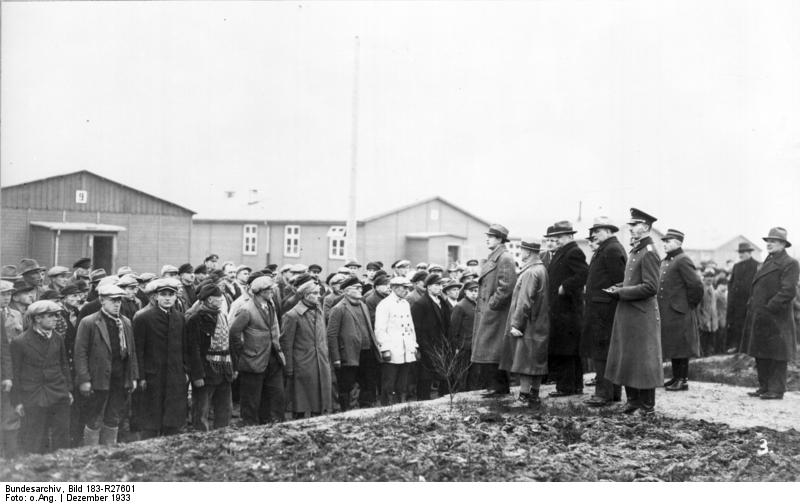 ADN-ZB/Archiv 1933 wurden nach der Machtergreifung durch die faschistischen Nationalsozialisten in Deutschland die Konzentrationslager für politische Gegner errichte. UBz.: das Konzentrationslager Esterwegen im Emsland bei Papenburg im Jahre 1933. "Der Inspekteur der Geheimen Staatspolizei Ministerialrat Dr. Diels bei seiner Ansprache an die auf Grund einer Amnestie anläßlich der Novemberwahl zu Weihnachten 1933 zur Entlassung kommenden Häftlinge".